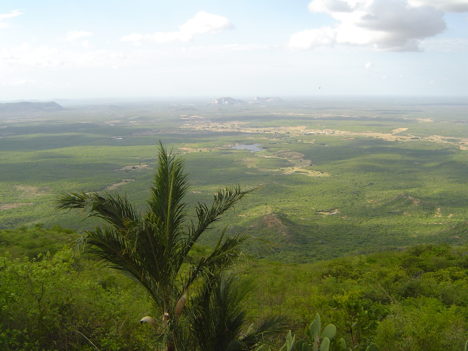 Panorama picture of the sertão in Rio Grande do Norte, Brazil.